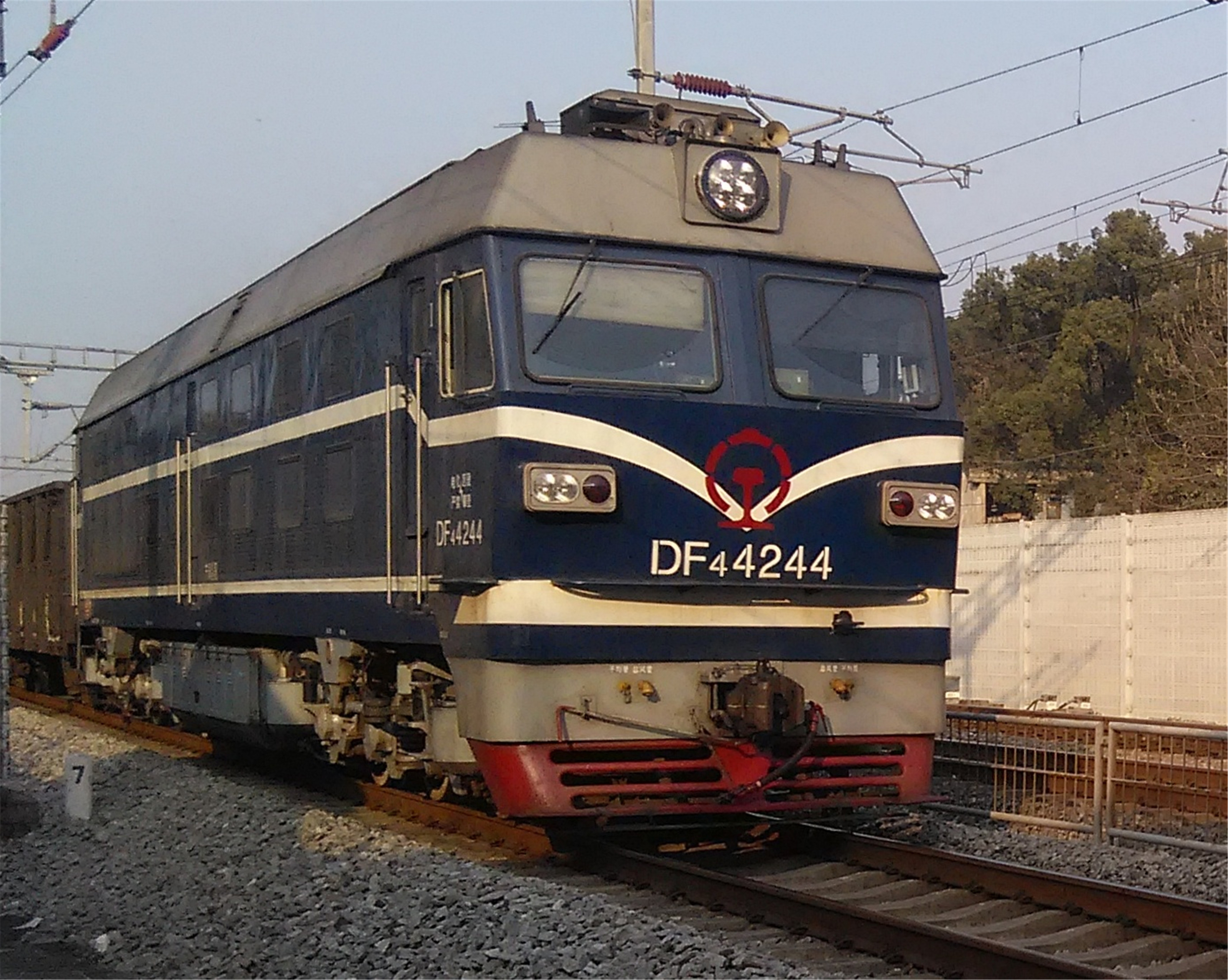 一台东风4C型内燃机车牵引货列进入灵川站。这是继2016年10月之后，第二次在湘桂铁路永州到柳州区间拍得南宁铁路局南宁机务段东风4C型内燃机车！